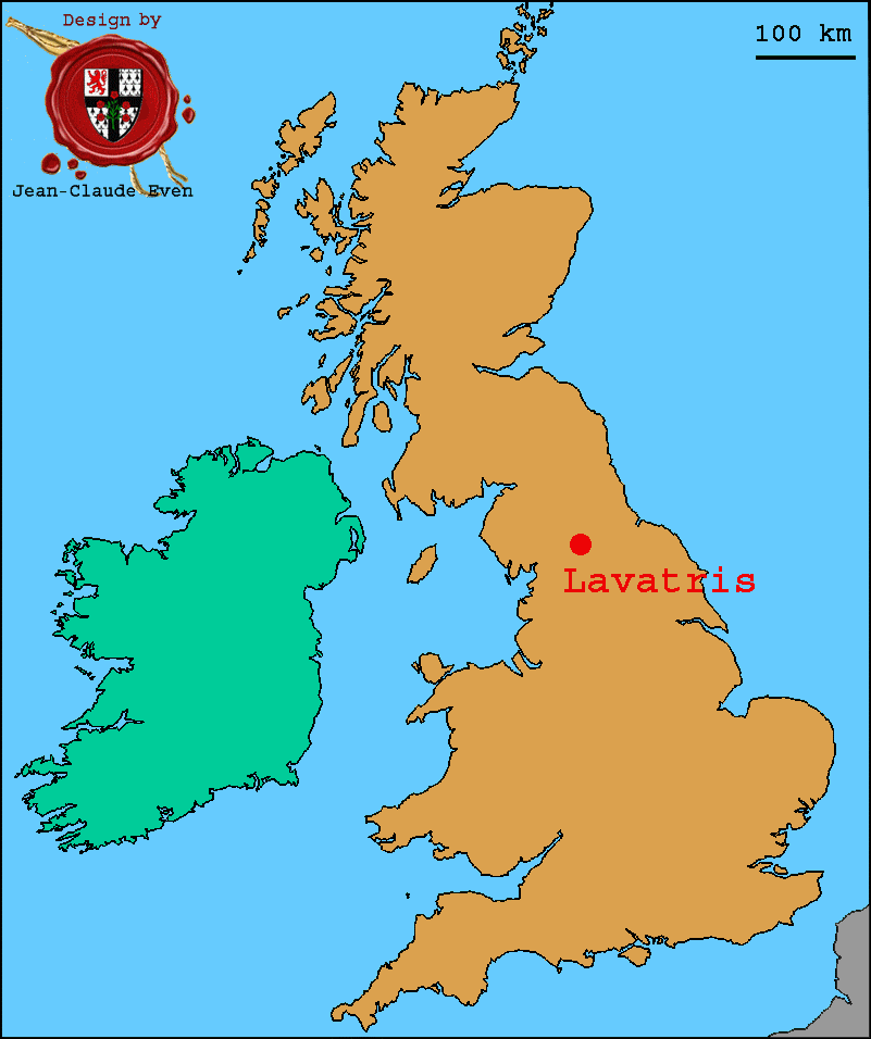 Bowes - Lavatris